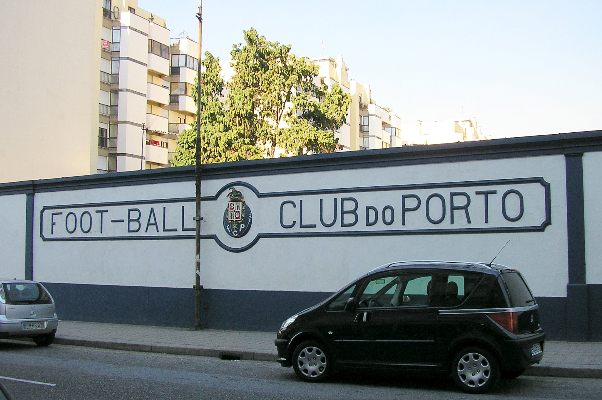 "Campo da Constituição", old playing ground of FC Porto, Portugal